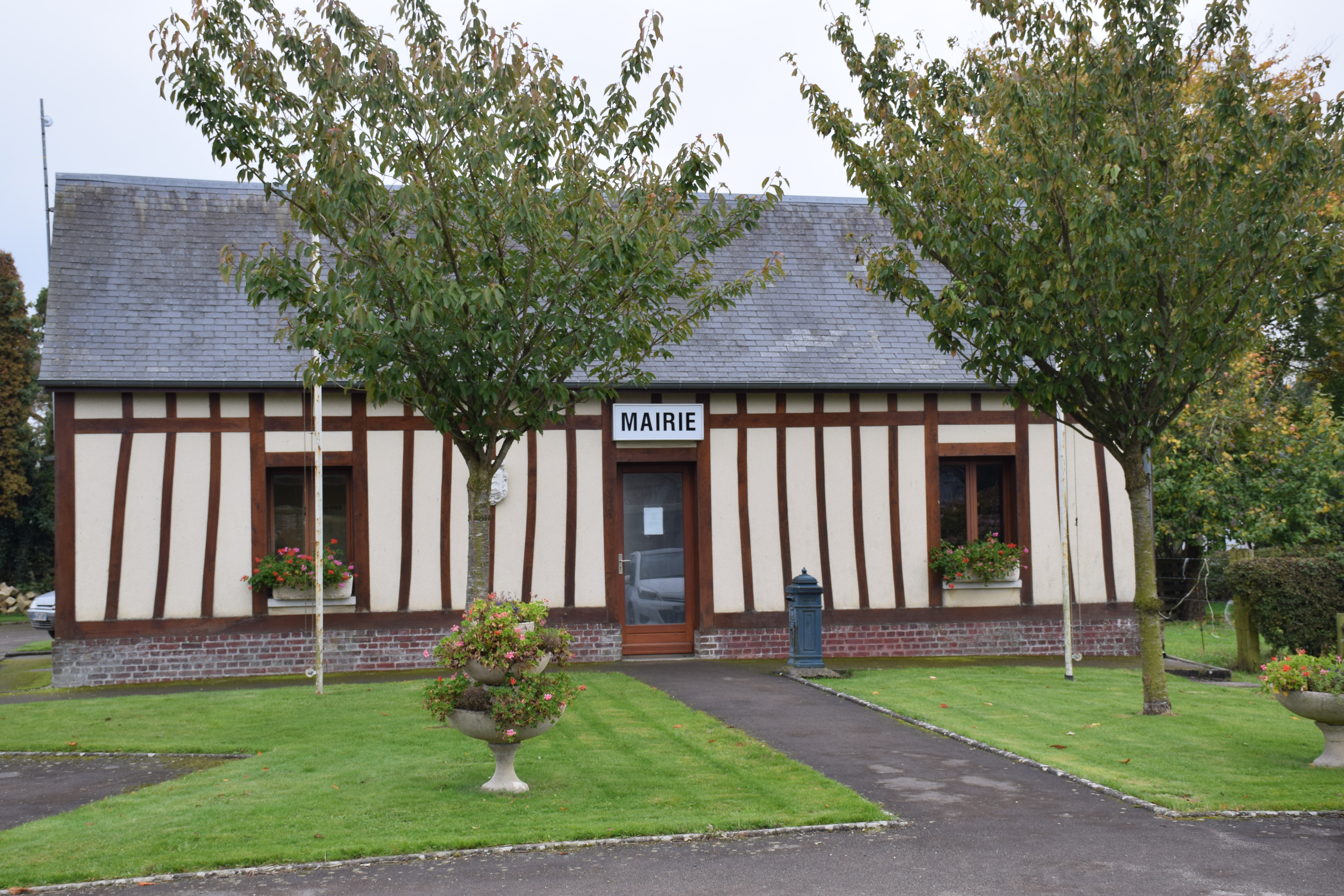 Mairie